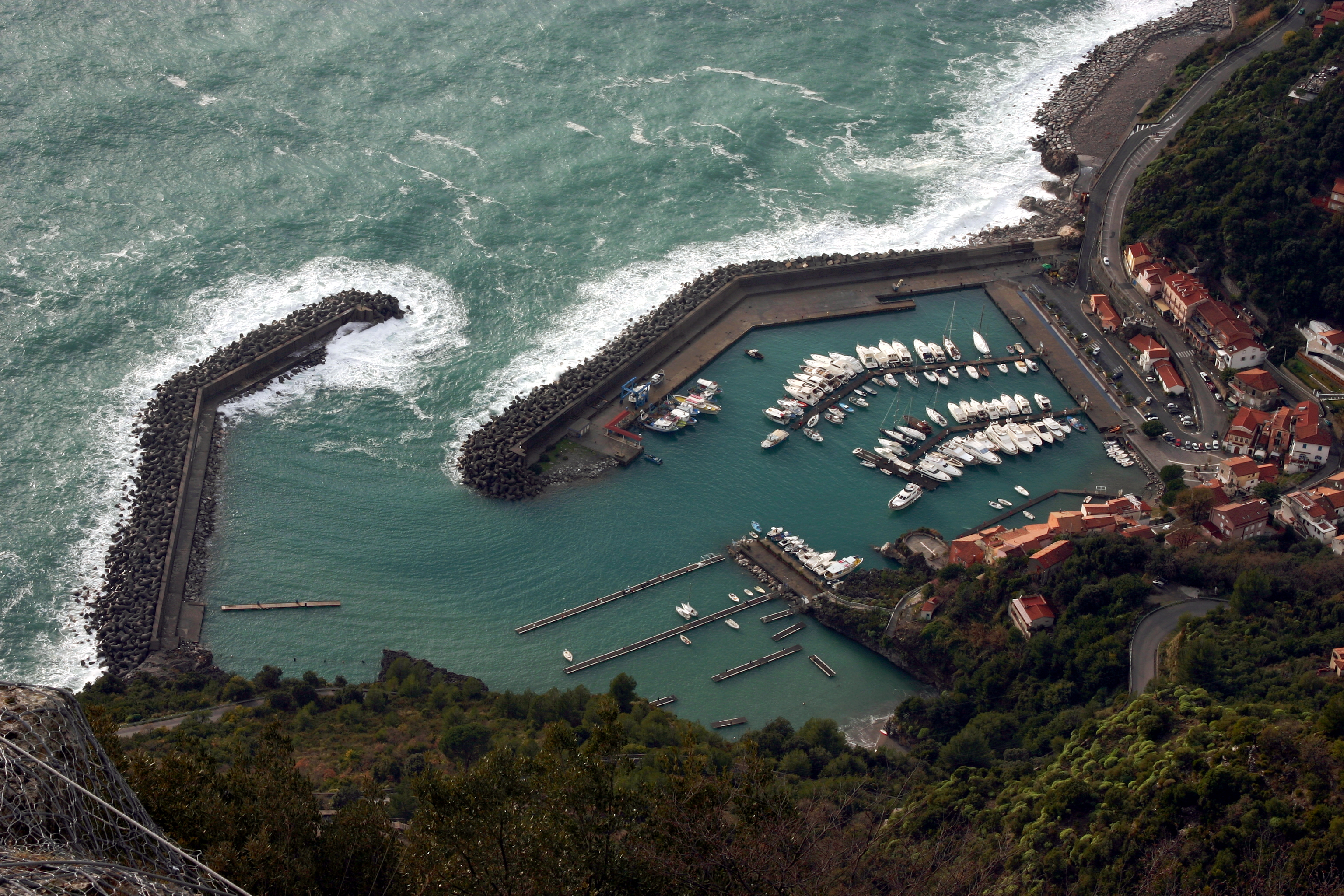 Vista a partir do Cristo Redentore.